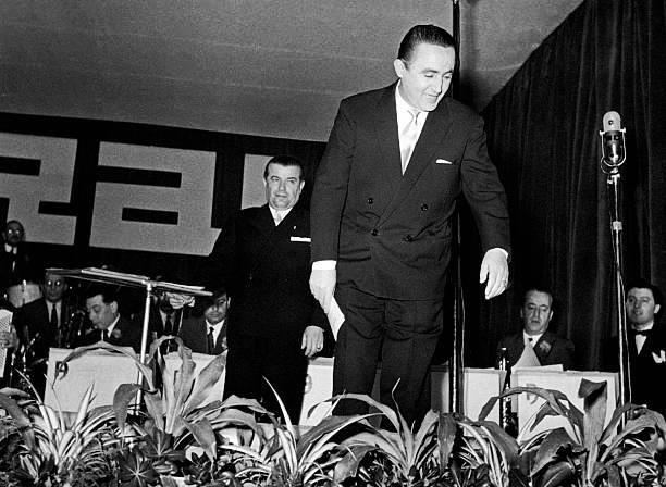 Oscar Carboni sul palco del Festival di Sanremo 1952